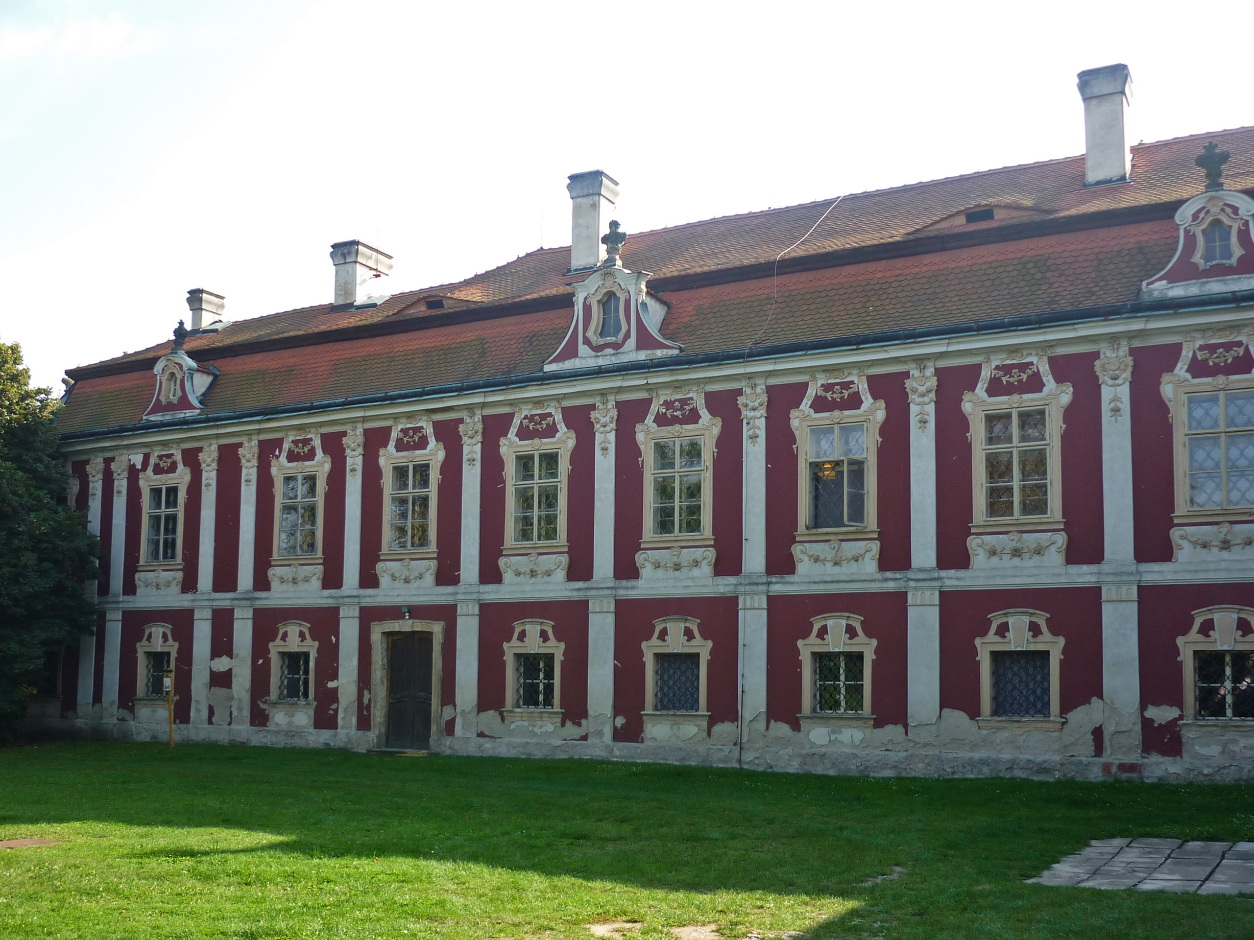 Schloss in Stecknitz (Stekník) bei Saaz (Žatec)